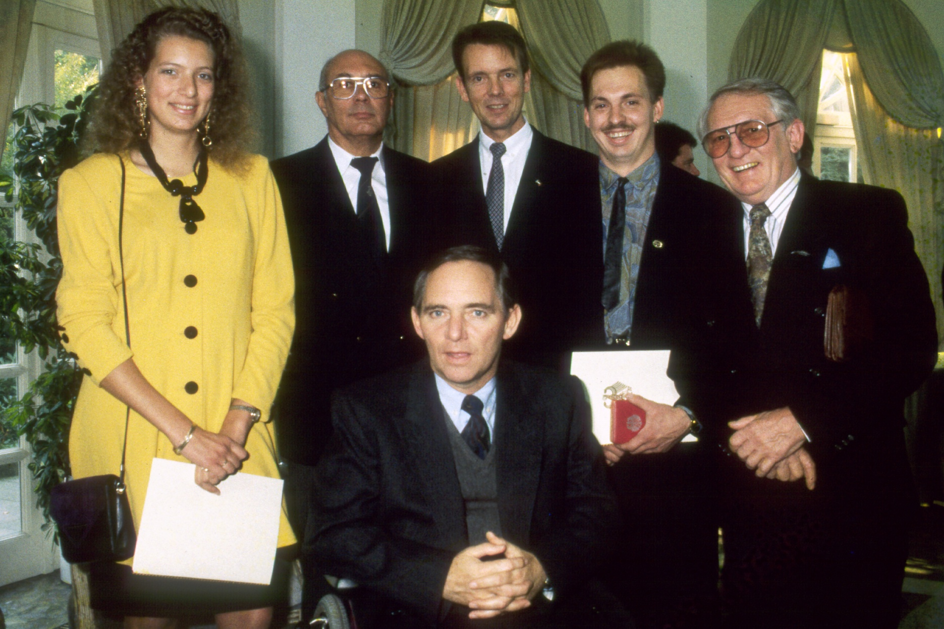 Die Motorbootrennfahrer Claudia (li.) und Ekkehard Knape (3. v.re.) aus Bergisch Gladbach sowie Peer (2. v.re.) und Hans-Georg Krage (re.) aus Berlin bei der Verleihung des Silbernen Lorbeerblattes mit Innenminister Schäuble